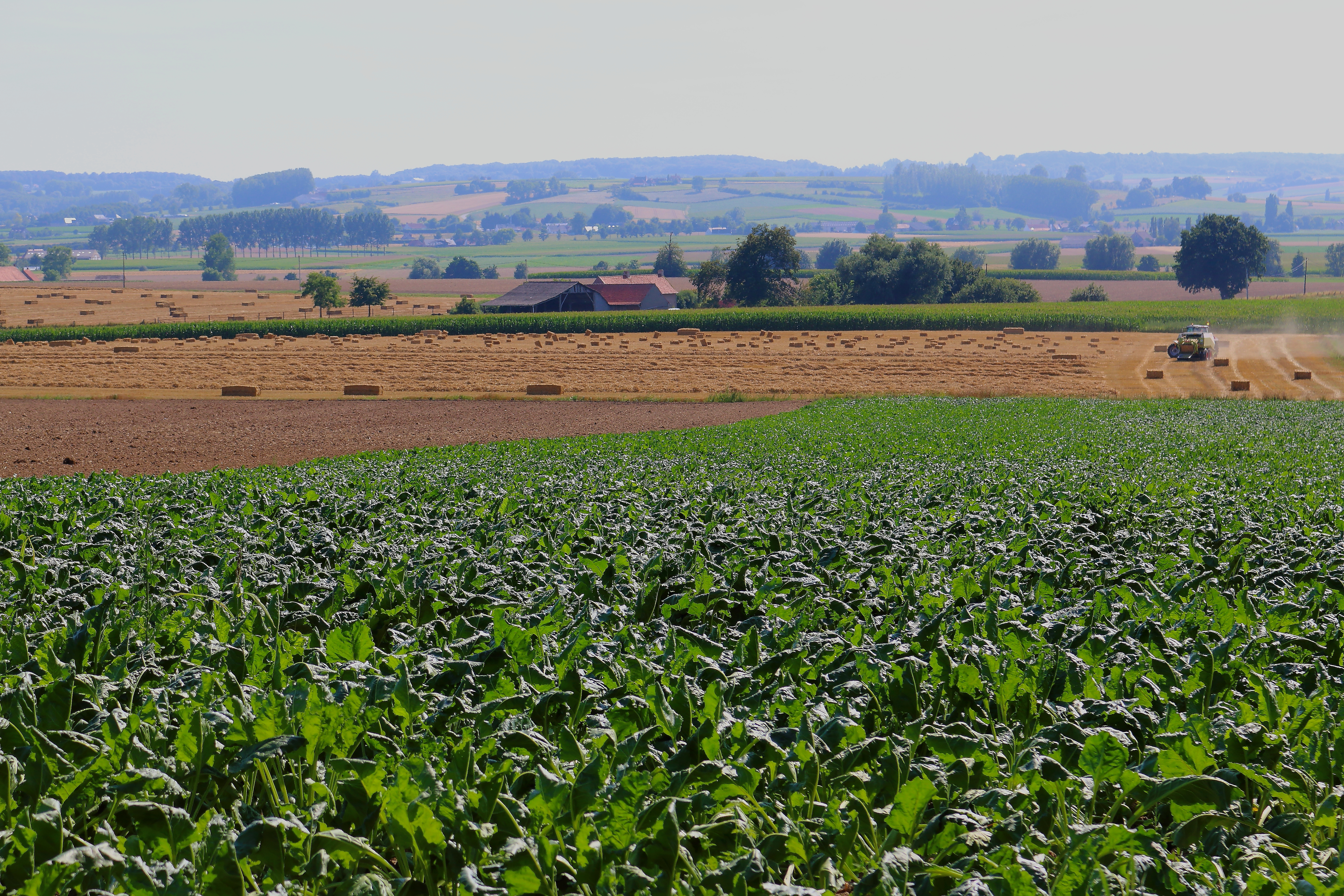 Vlaamse Ardennen, Oudenaarde, Vlaanderen, België